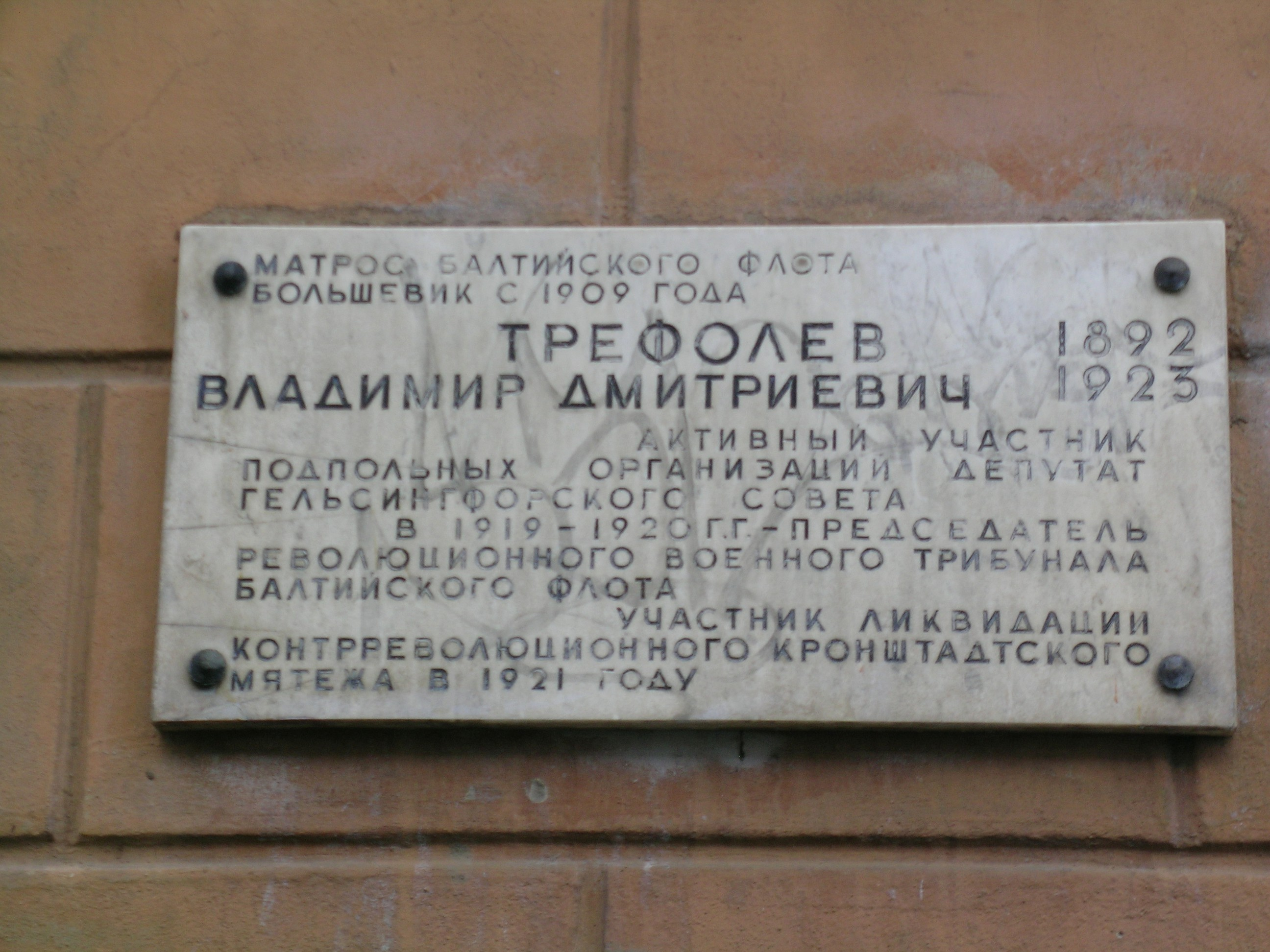 Мемориальная доска. Матрос Балтийского флота. Большевик с 1909 года Трефолев Владимир Дмитриевич 1892–1923. Активный участник подпольных организаций, депутат гельсингфорского совета. В 1919–1920 г.г. – председатель революционного военного трибунала Балтийского флота. Участник ликвидации контрреволюционного кронштадтского мятежа в 1921 году.